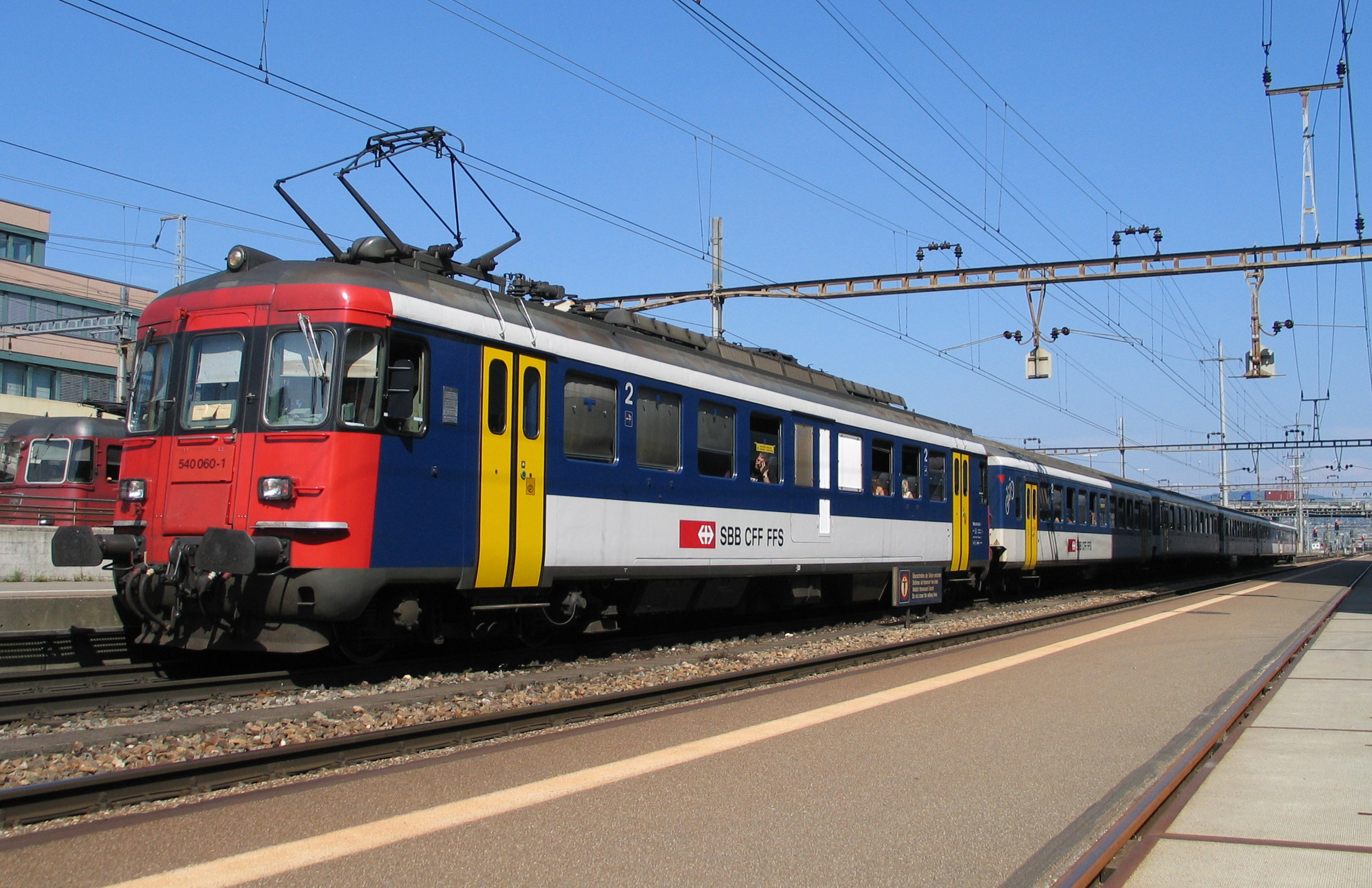 SBB RBe 540-Triebwagen im S-Bahn-Betrieb in Zürich Altstetten